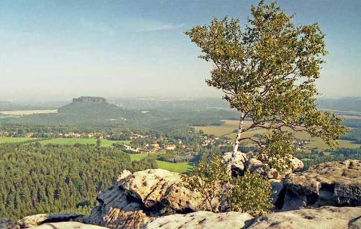 Stolová hora Lilienstein z vyhlídky na Gohrisch